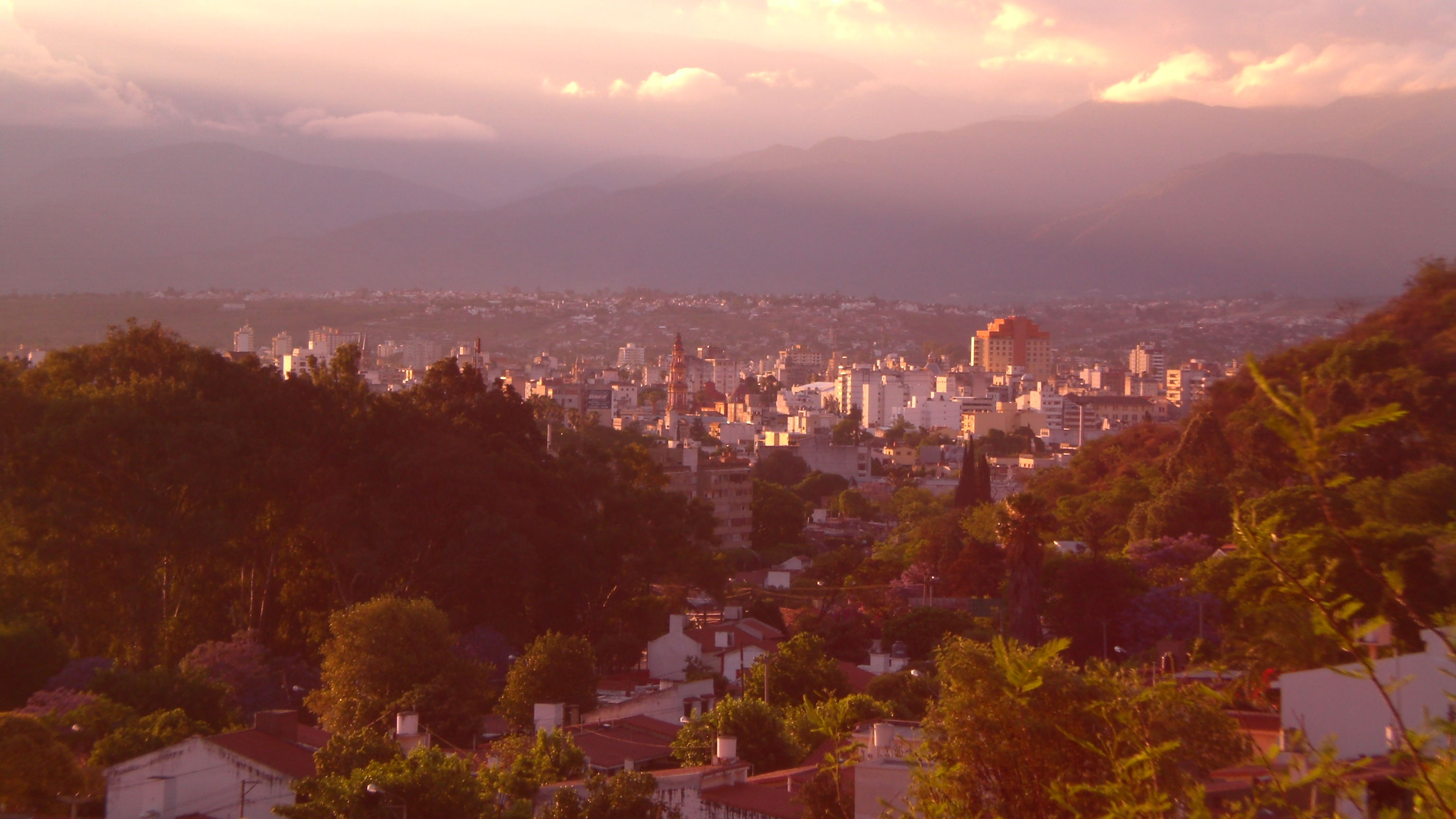 Salta, Argentina.